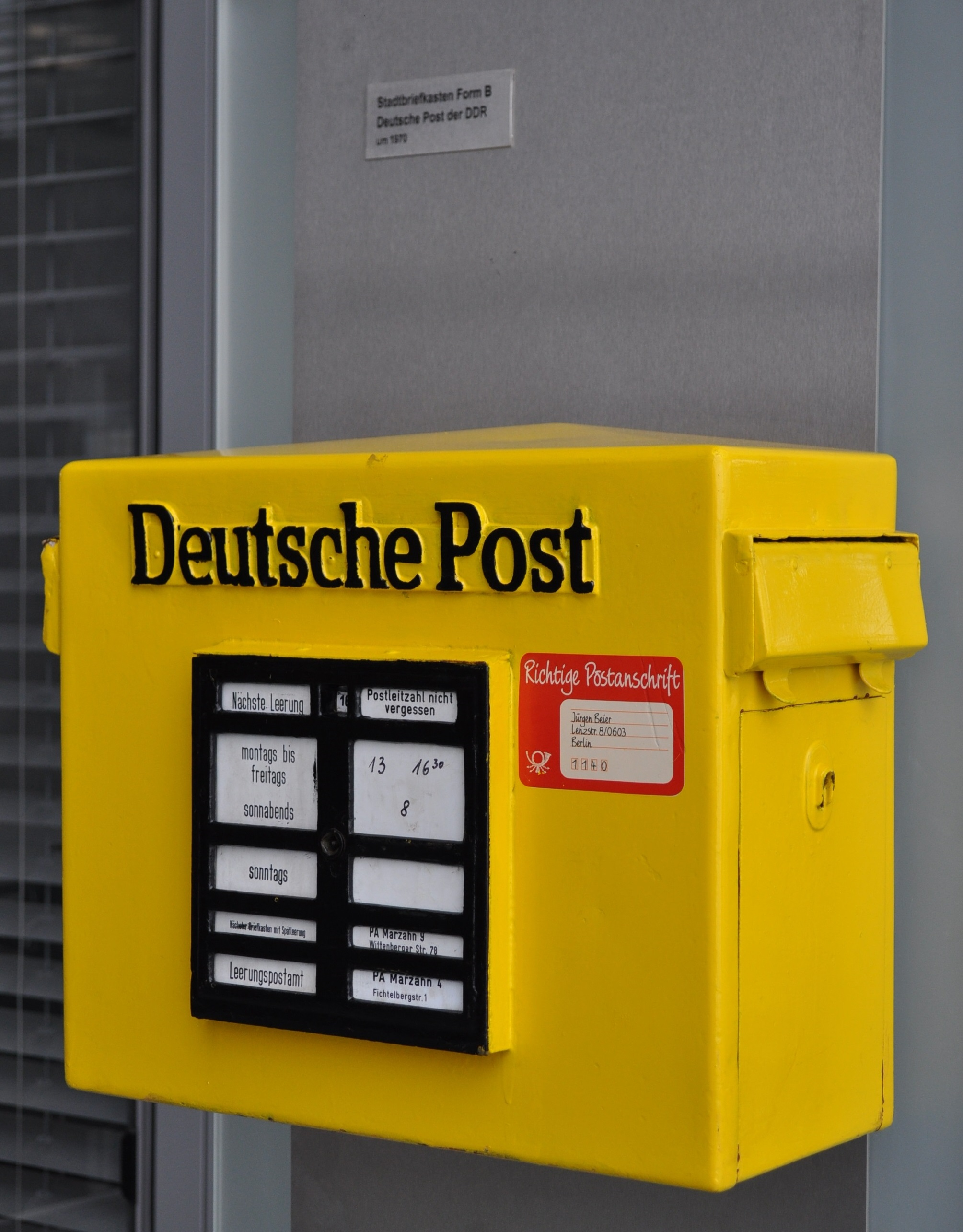 Stadtbriefkasten Form B Deutsche Post der DDR um 1970